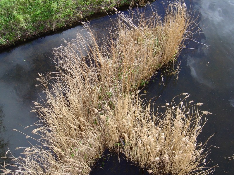 Dit is een van de restanten van de burchtmuur van kasteel Paddenpoel te Leiden. Gemaakt door Rob Honig, die vrijwillig afstand doet van alle rechten.